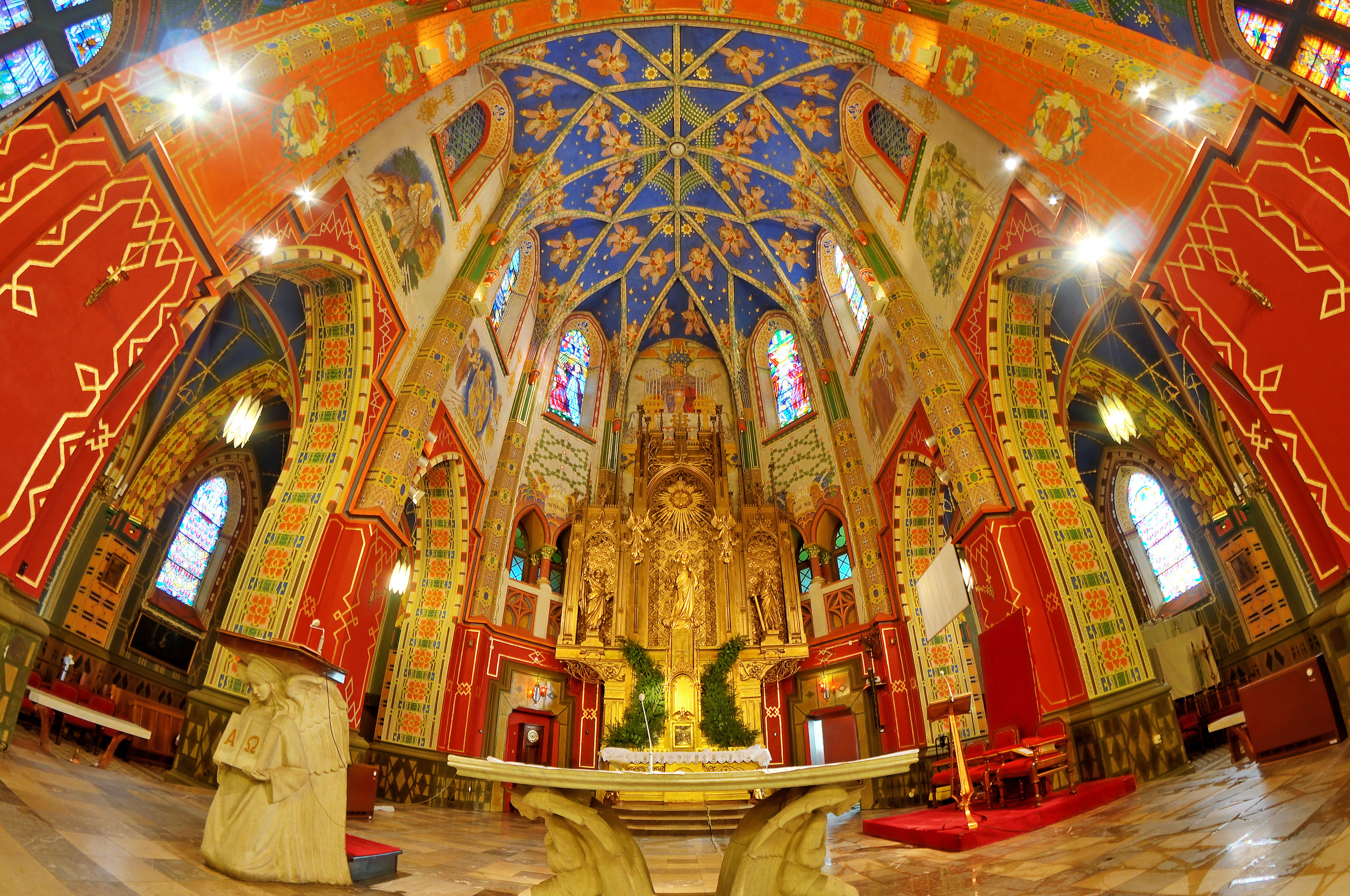 Odnowiona polichromia autorstwa Józefa Mehoffera, wykonana w kościele pw. Najświętszego Serca Pana Jezusa w Turku